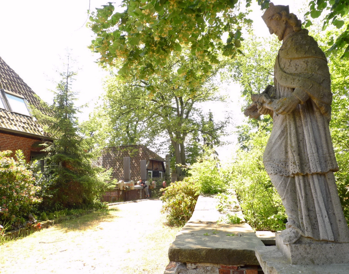 Sythener Hellweg - Brücke über den Heubach in Hausdülmen an der „Großen Teichsmühle“